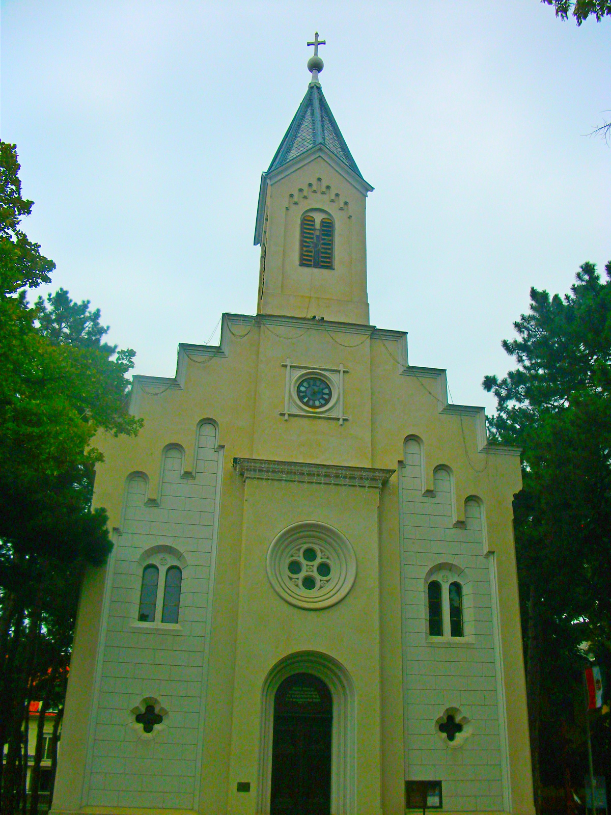 Az evangélikus templom Mosonmagyaróváron a Magyar u. 33. alatt.